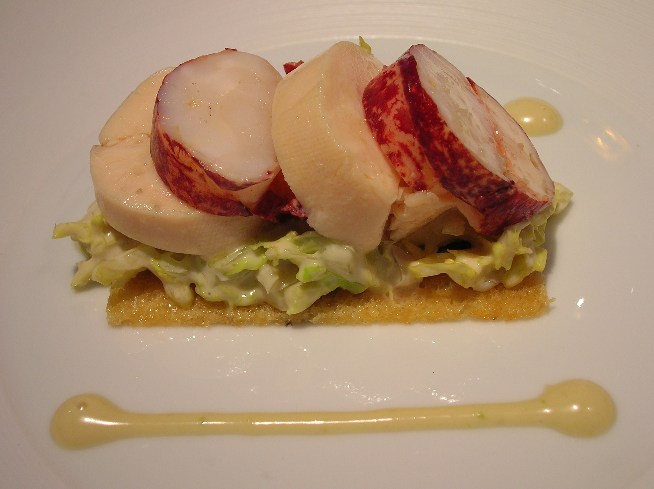 לובסטר סקוטי ותרנגולת חווה אנגליה במסעדת גורדון רמזי